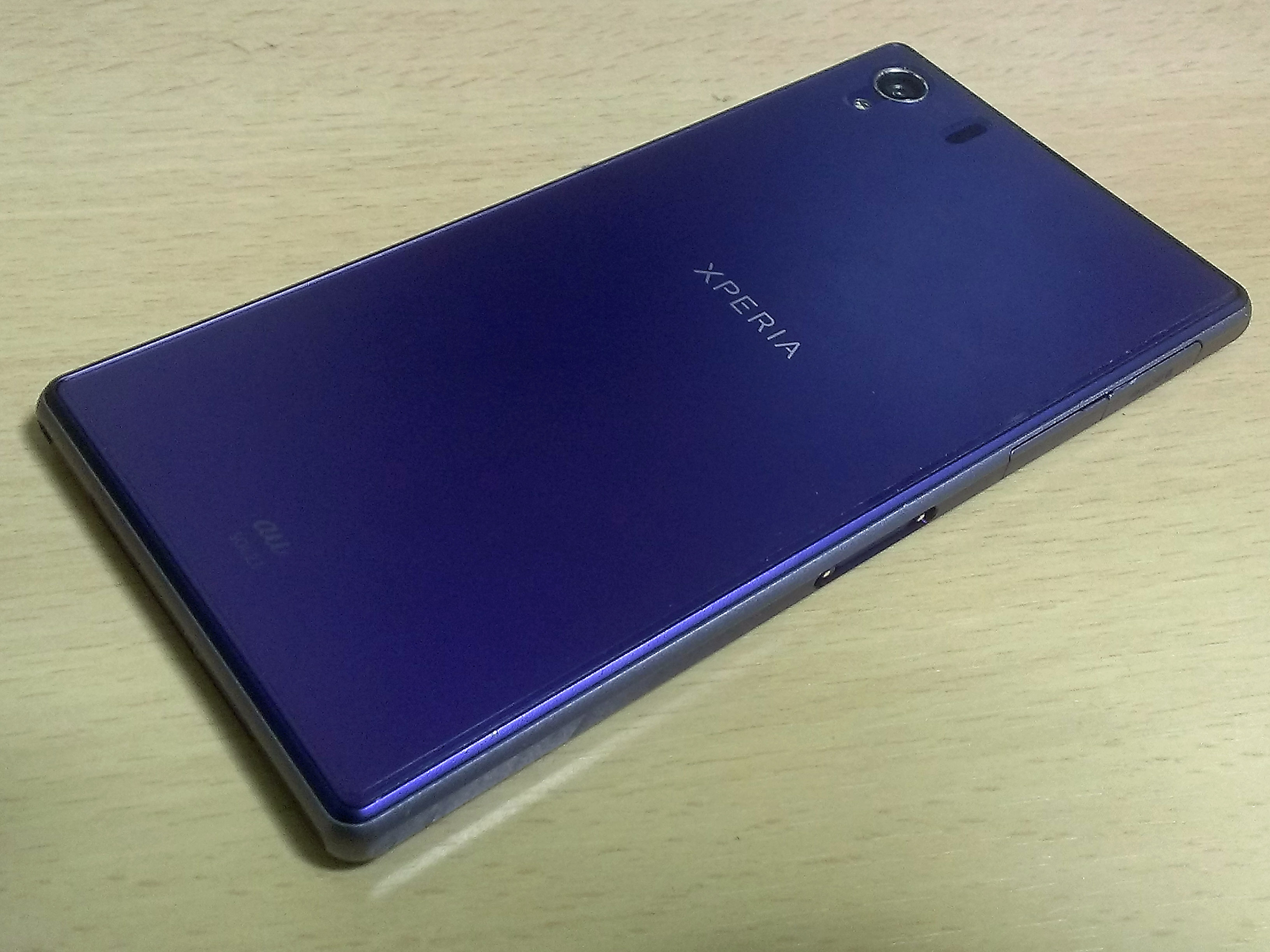 SOL23 裏面